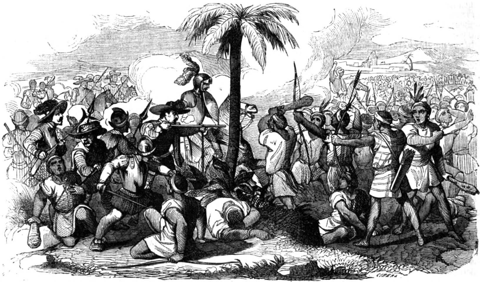 Grabado de la edición española de la obra de Prescott, que representa una batalla entre españoles e indígenas en las llanuras de Riobamba, actual Ecuador. Episodio de la conquista del Perú, 1534.